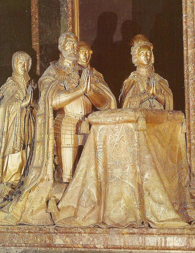 Cenotafio de Carlos I de España y su familia, colocado en el altar mayor de la basílica del Monasterio de San Lorenzo el Real del Escorial, en la provincia de Madrid. (España).